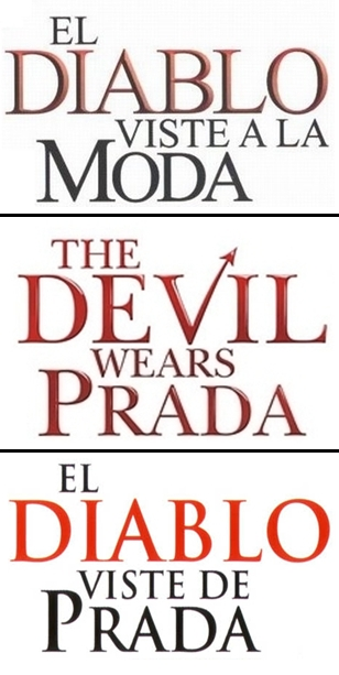 Logotipo de la pelicula "The Devil Wears Prada" (Hispanoamérica: "El diablo viste a la moda", España: "El diablo viste de Prada")